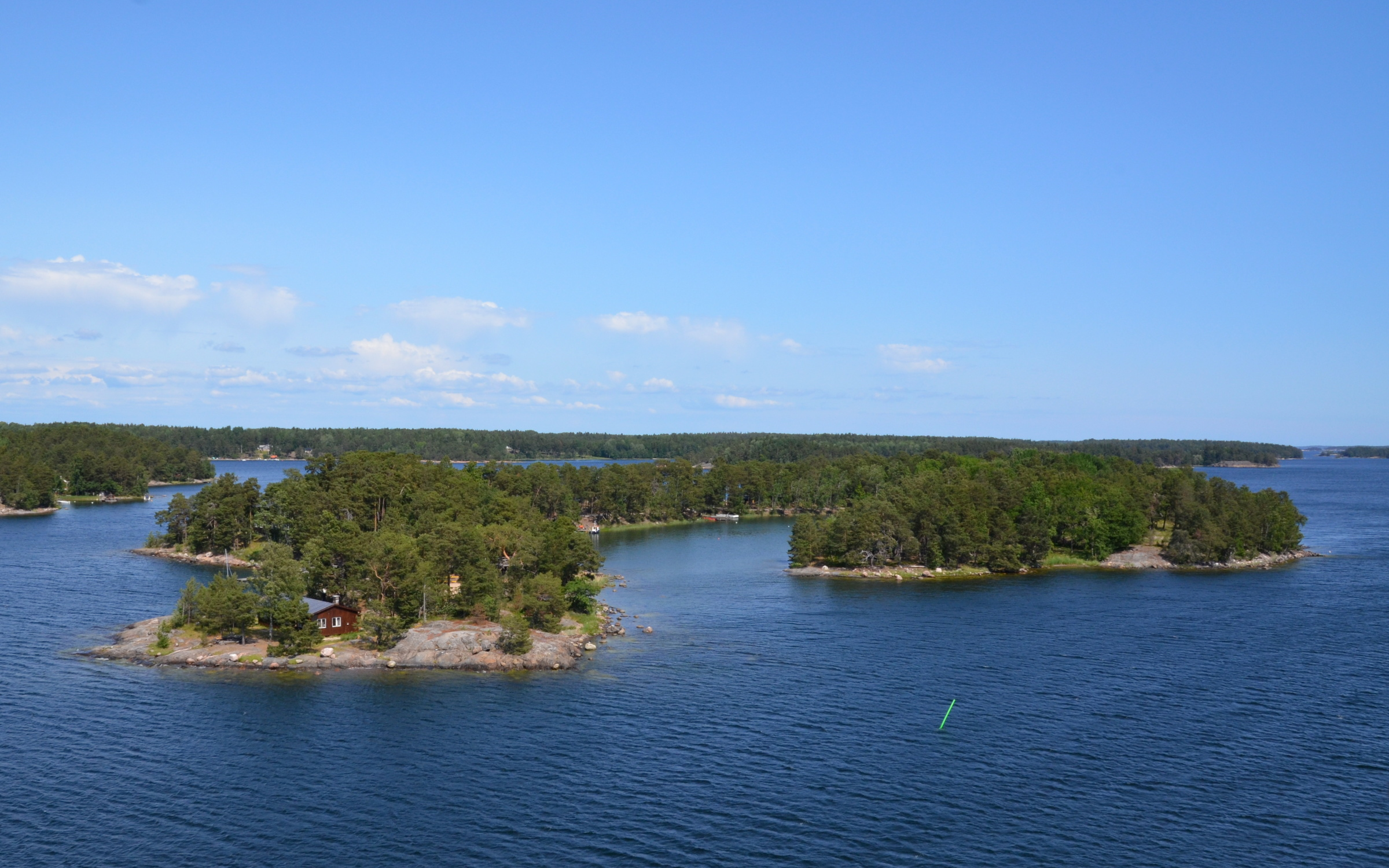 Ängsholmen vid Sollenkroka i Värmdö kommun